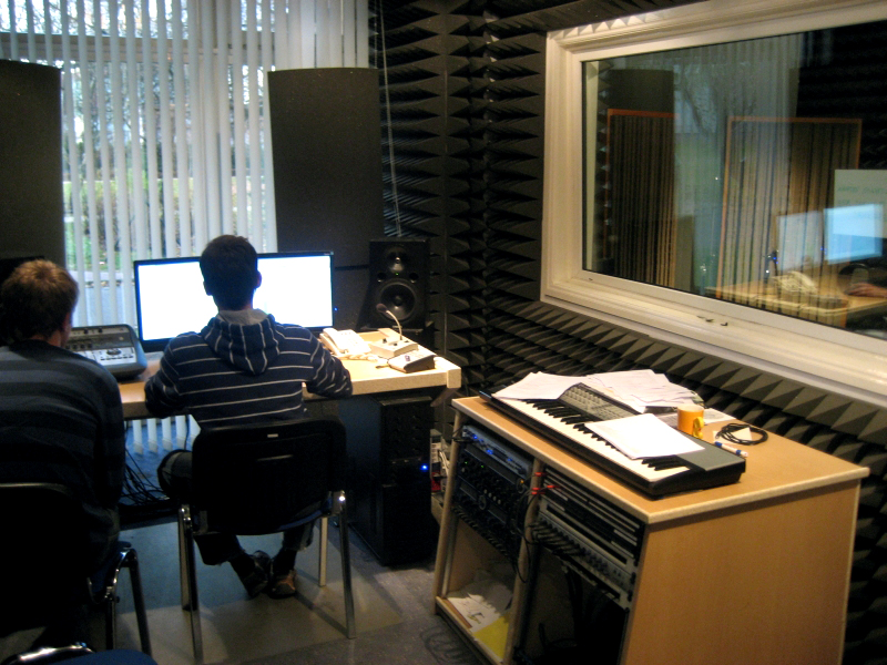 Radio Afera Poznań. Reżyserka studia nagraniowego.